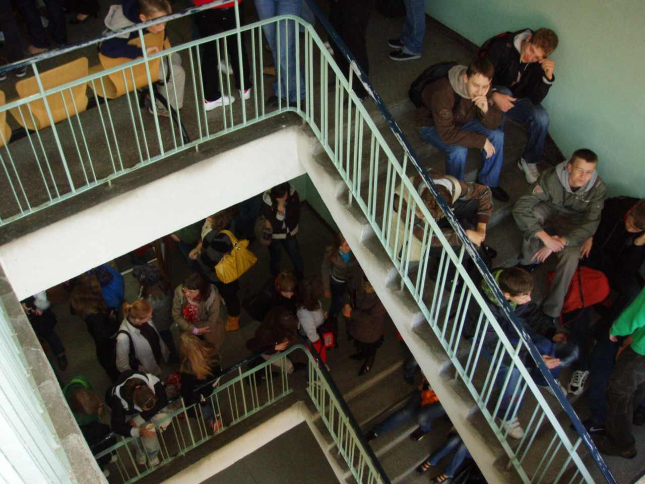 VI Olsztyńskie Dni Nauki, Wydział, Biologii